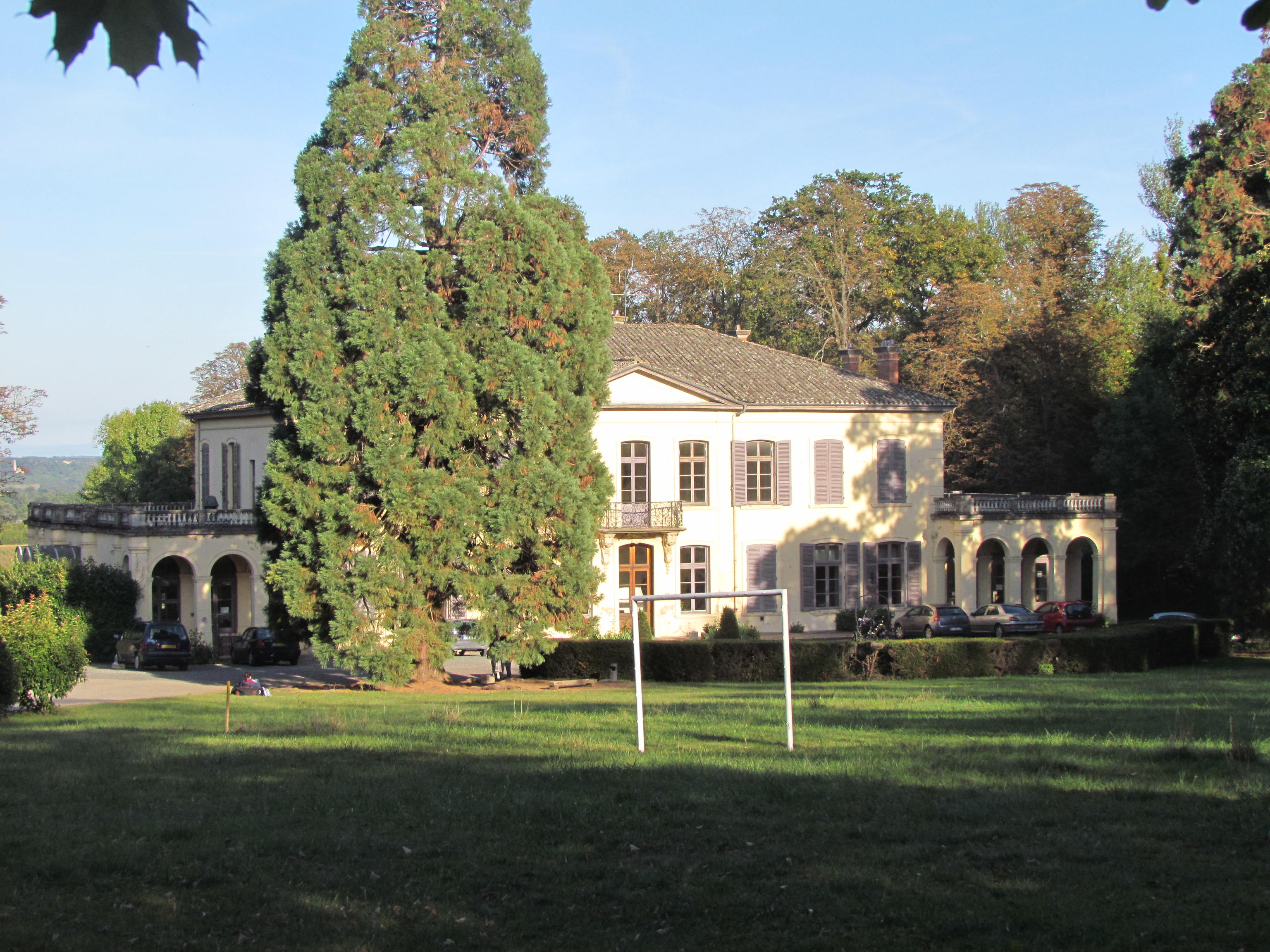 Chateau de Sermezy: Le corps principal du château et les deux pavillons à arcades .